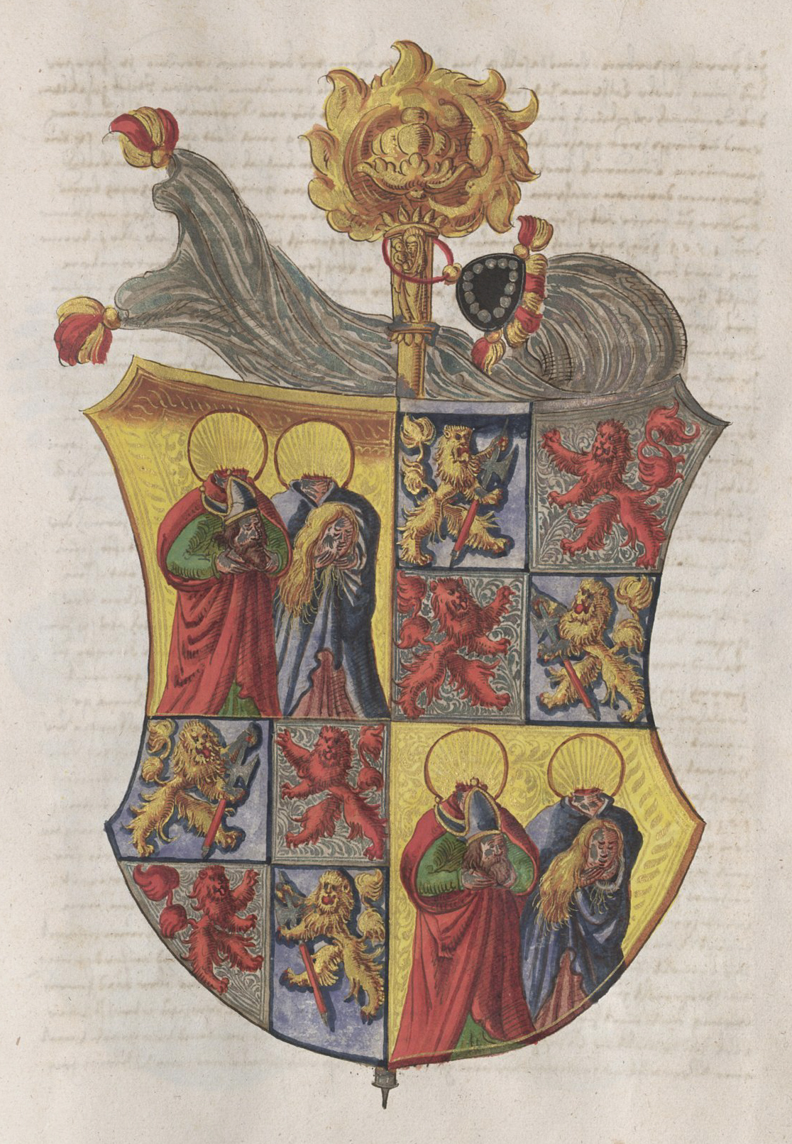 Wappen aus der Zimmerischen Chronik, Handschrift B, Württembergische Landesbibliothek Stuttgart, Cod. Don. 580a, S. 371, Wappen der Äbtissin Katharina von Zimmern